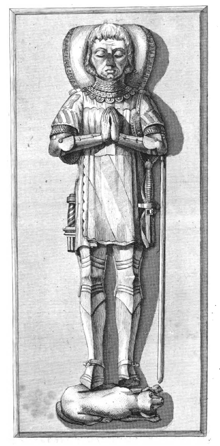 Gisant du tombeau de Jean de Cossa, Chevalier de l'Ordre du Croissant, Grand Sénéchal de Provence, et chambellan du Roi René, en la crypte de la Collégiale Royale Sainte Marthe à Tarascon.